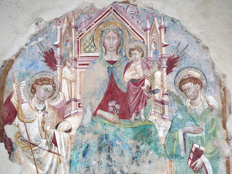 Castelbuono di Bevagna, Maesta